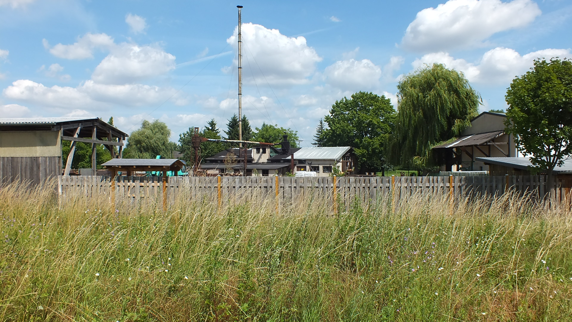 denkmalgeschütztes Sägewerk in Plossig